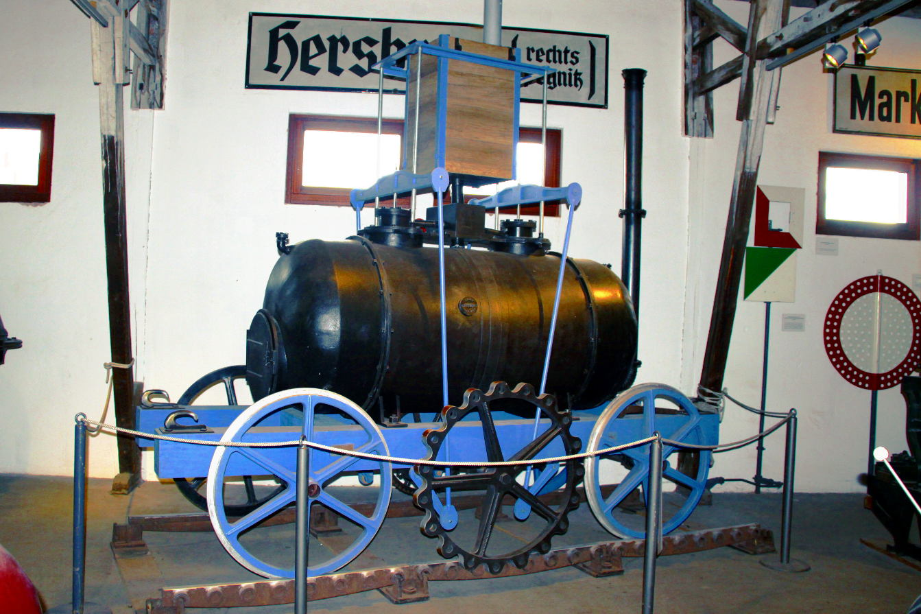 Geislauterner Dampfwagen Nachbau 2014 im Museumsdepot VM Nürnberg